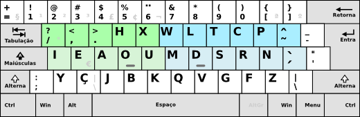 Layout BR-Nativo atualizado e disponível nativamente em sistemas Linux, com drivers compatíveis com sistemas Windows e Mac OS.